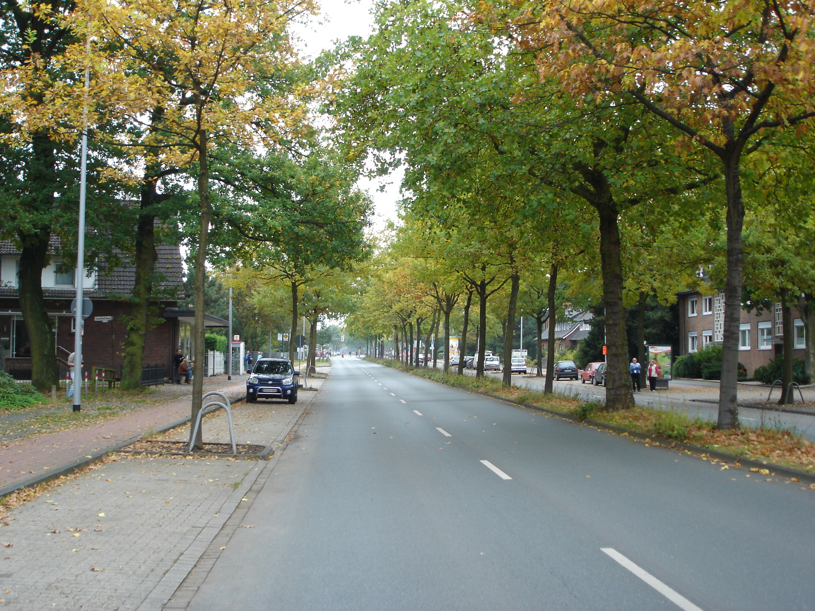 Bundesstrasse 219 in Münster-Kinderhaus, Germany